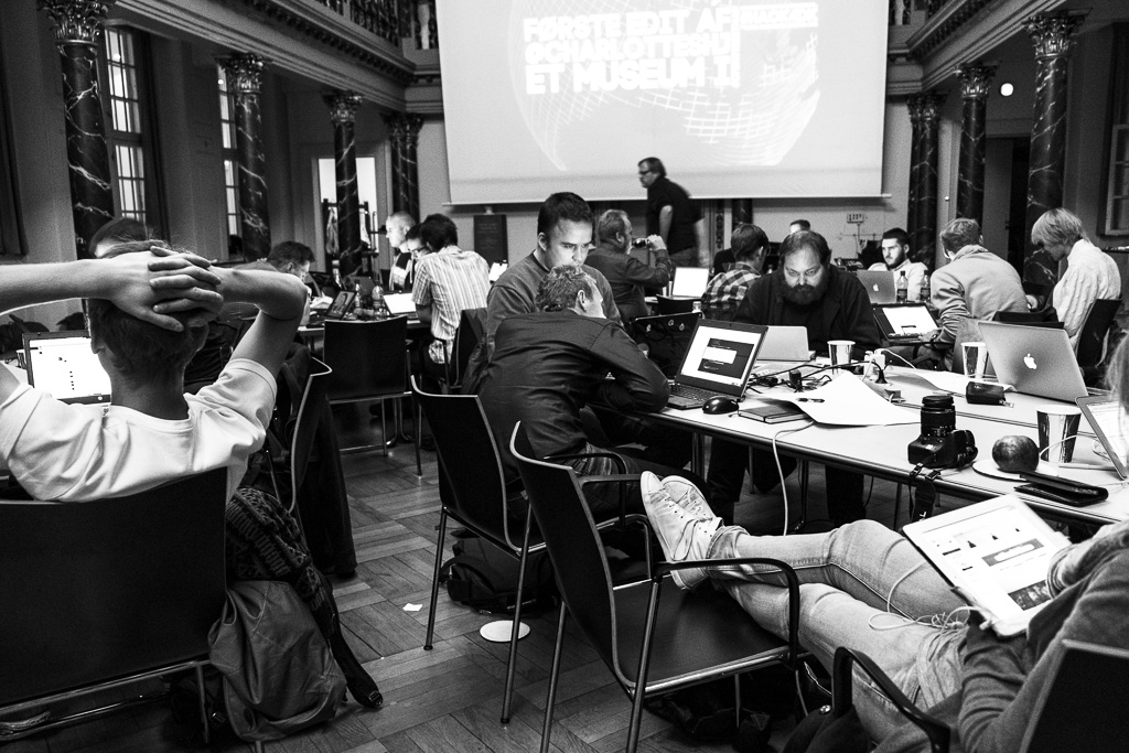 Working @ HACK4DK